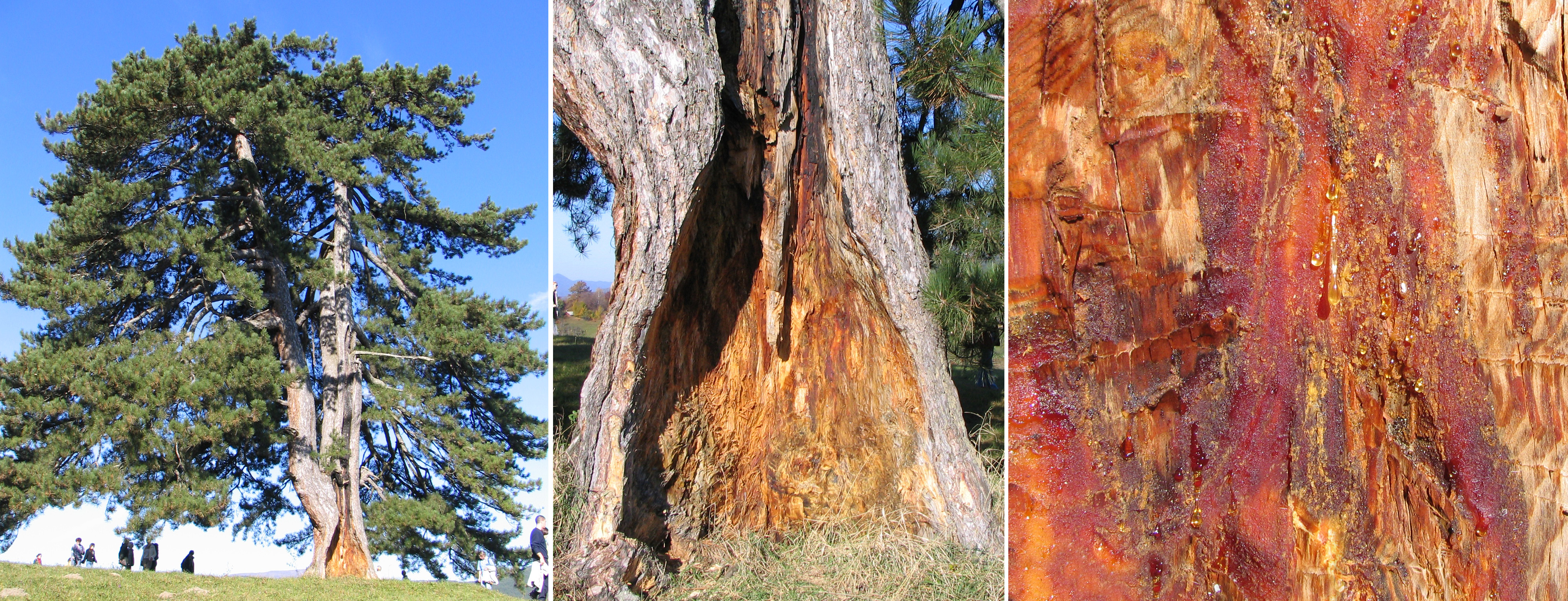 Црни бор за луч, Гоч (аутор: Михаило Грбић).